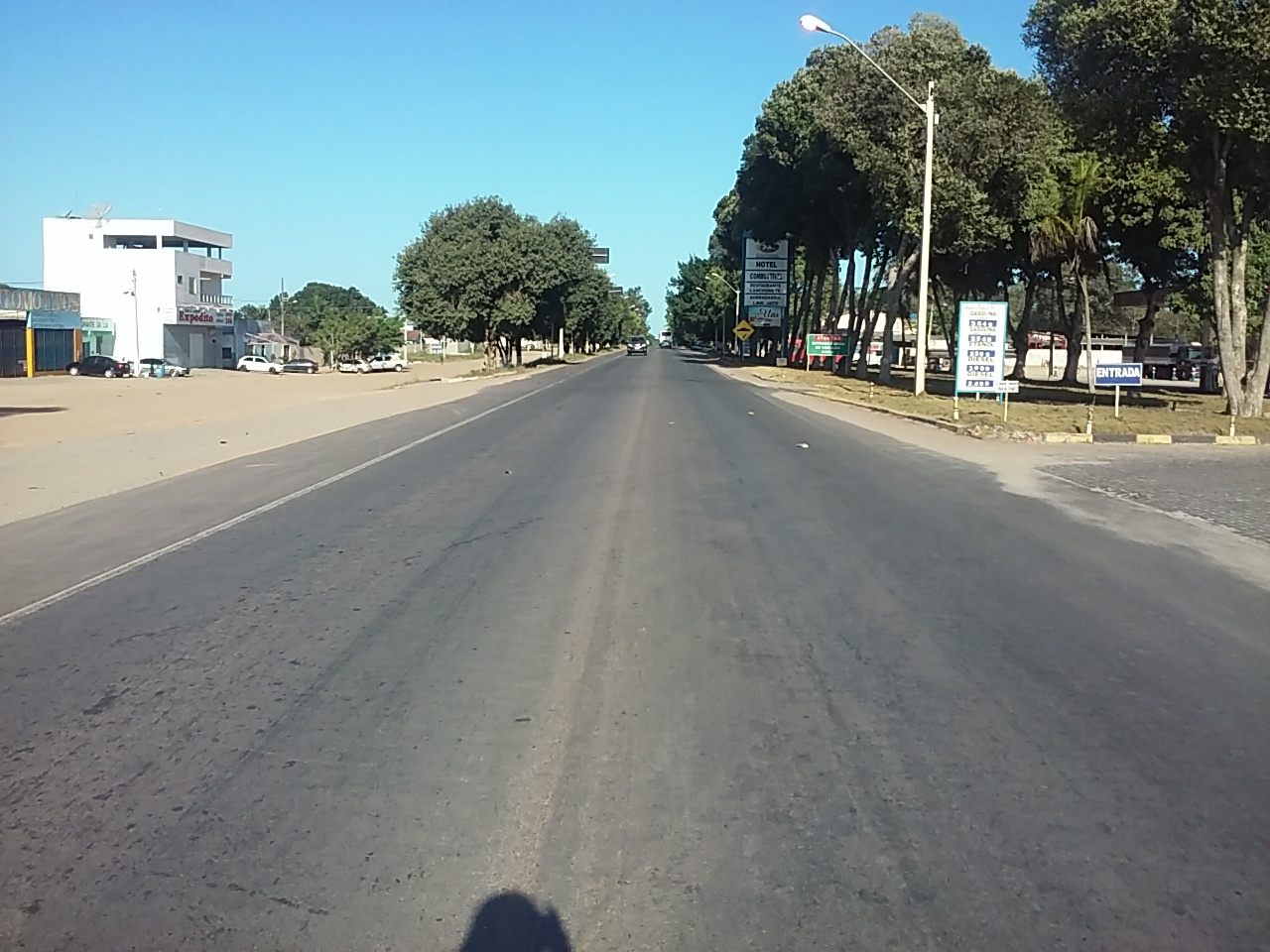 BR-418/BA - KM 87,5 (POSTO DA MATA - NOVA VIÇOSA)